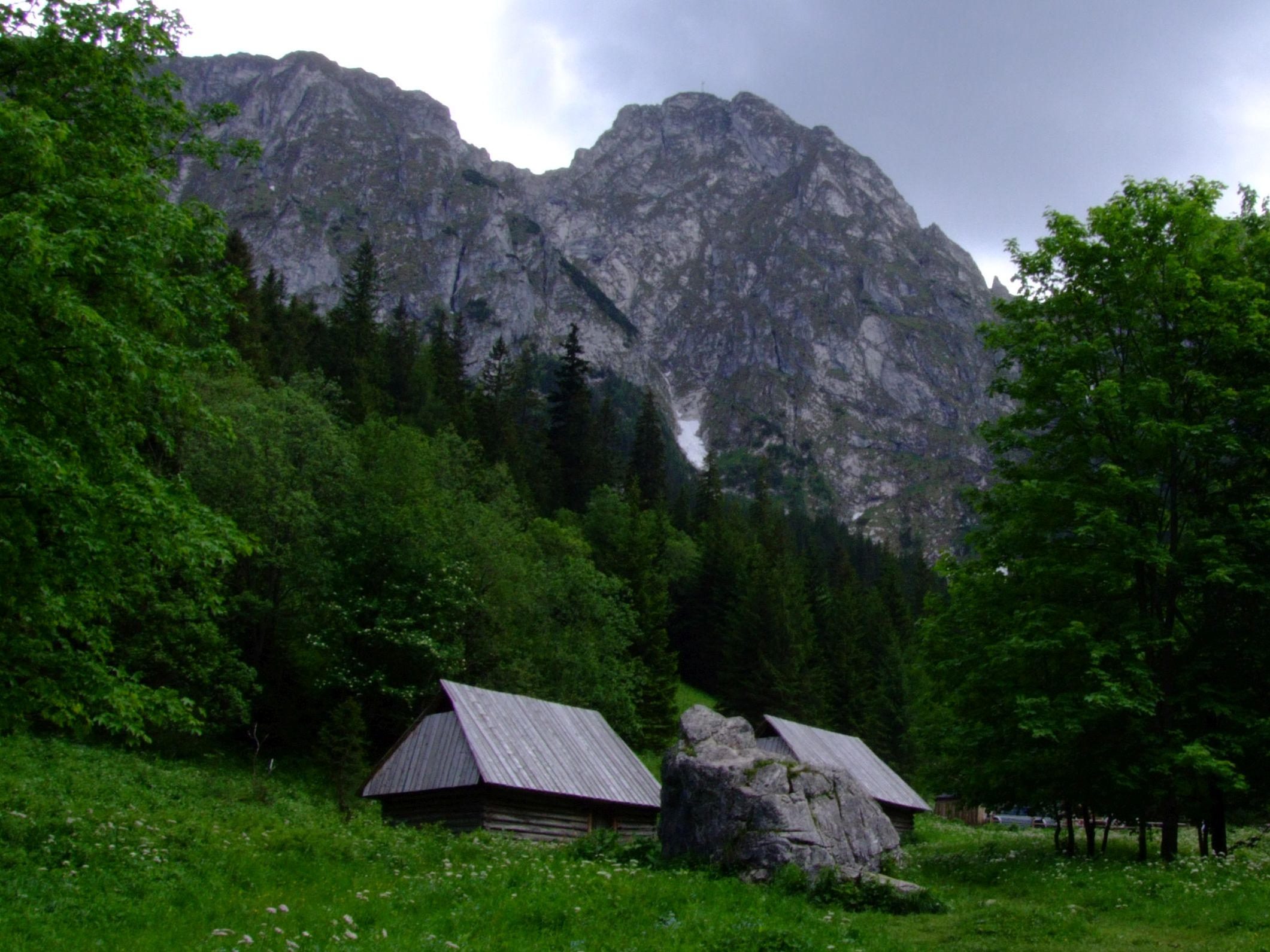 Polana Strążyska i Giewont